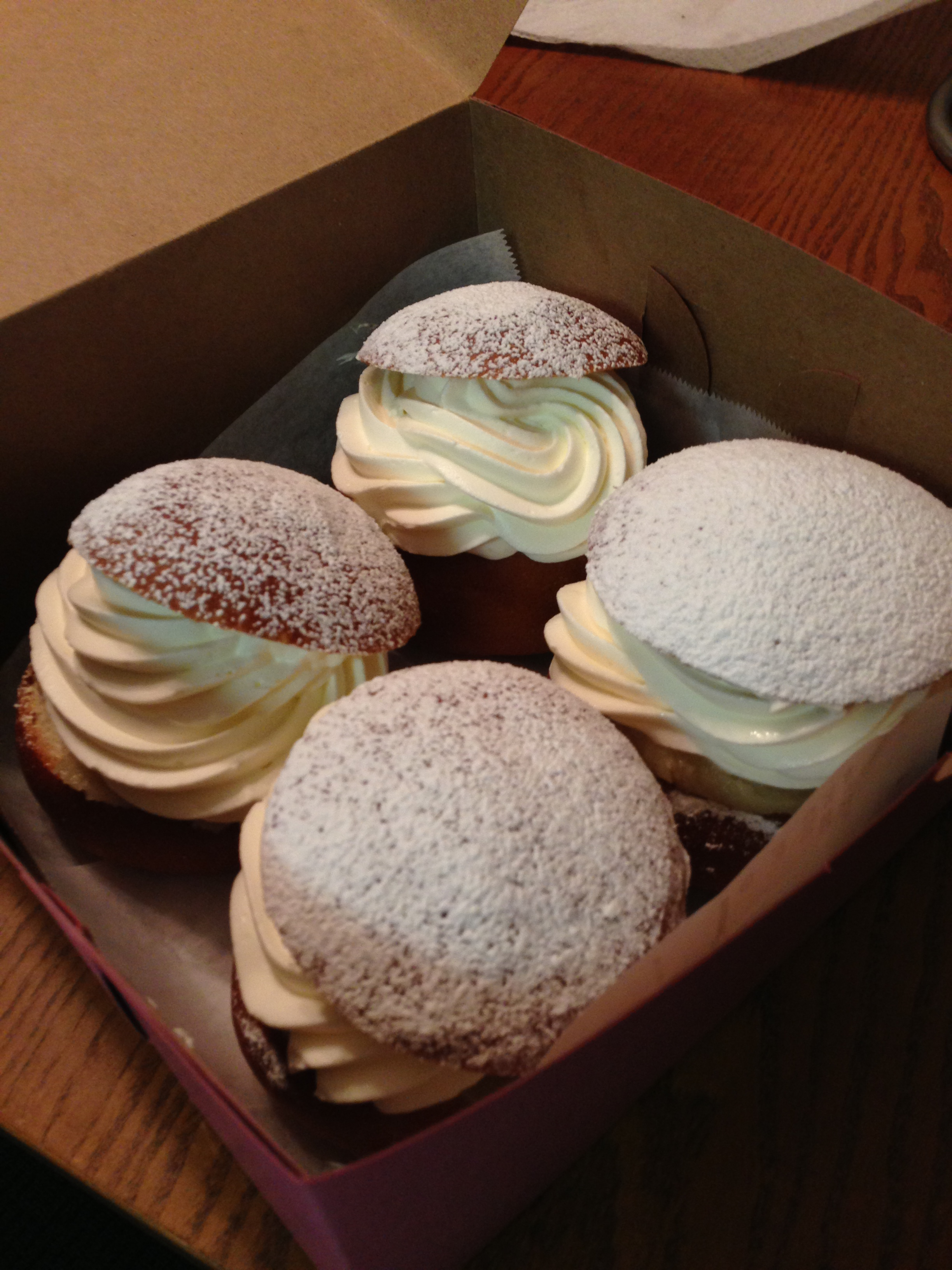 Pastries